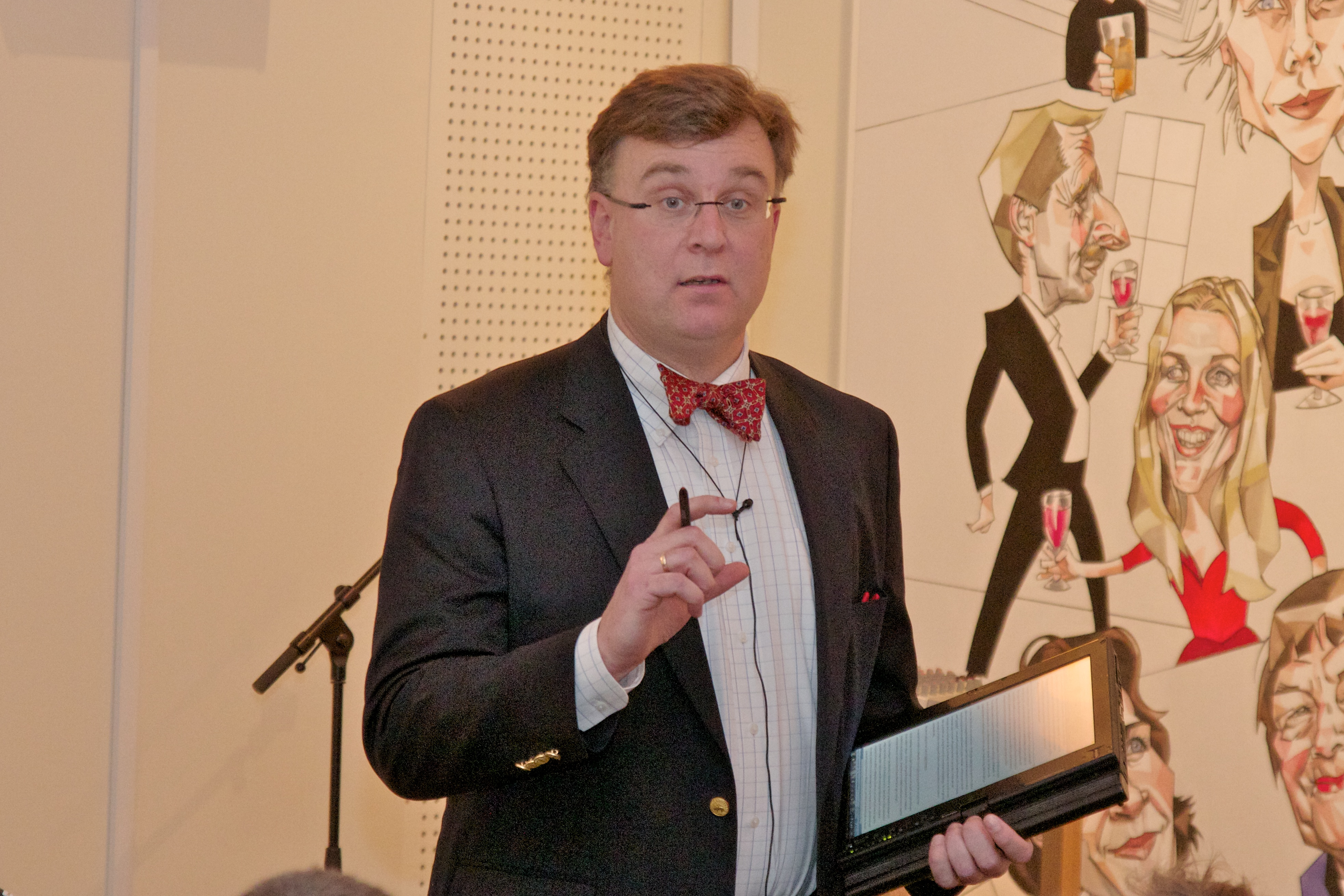 Espen Andersen under feiringen av Wikipedias tiårsdag i Oslo.